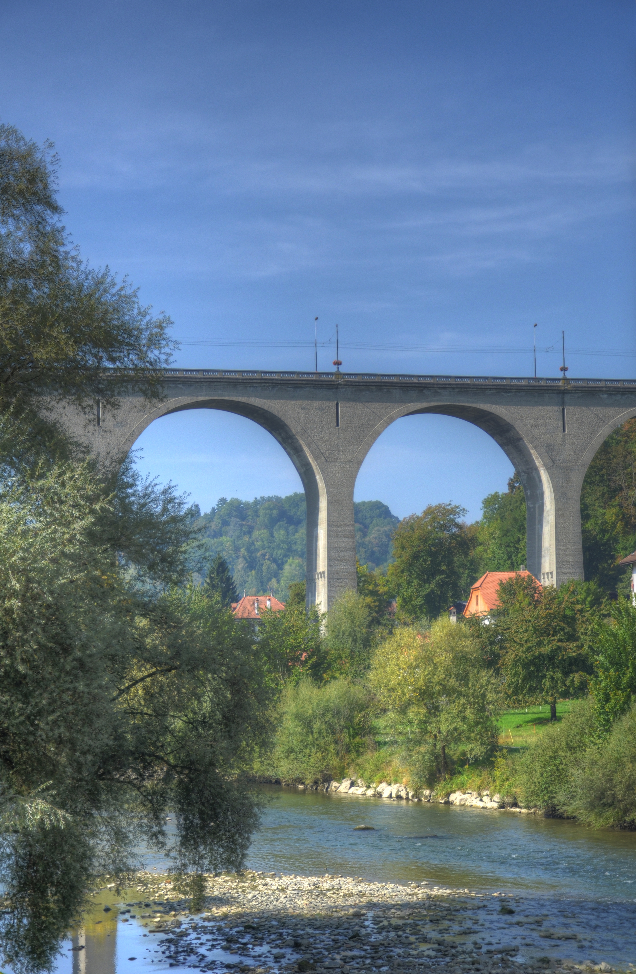 Zähringer-Brücke in Freiburg